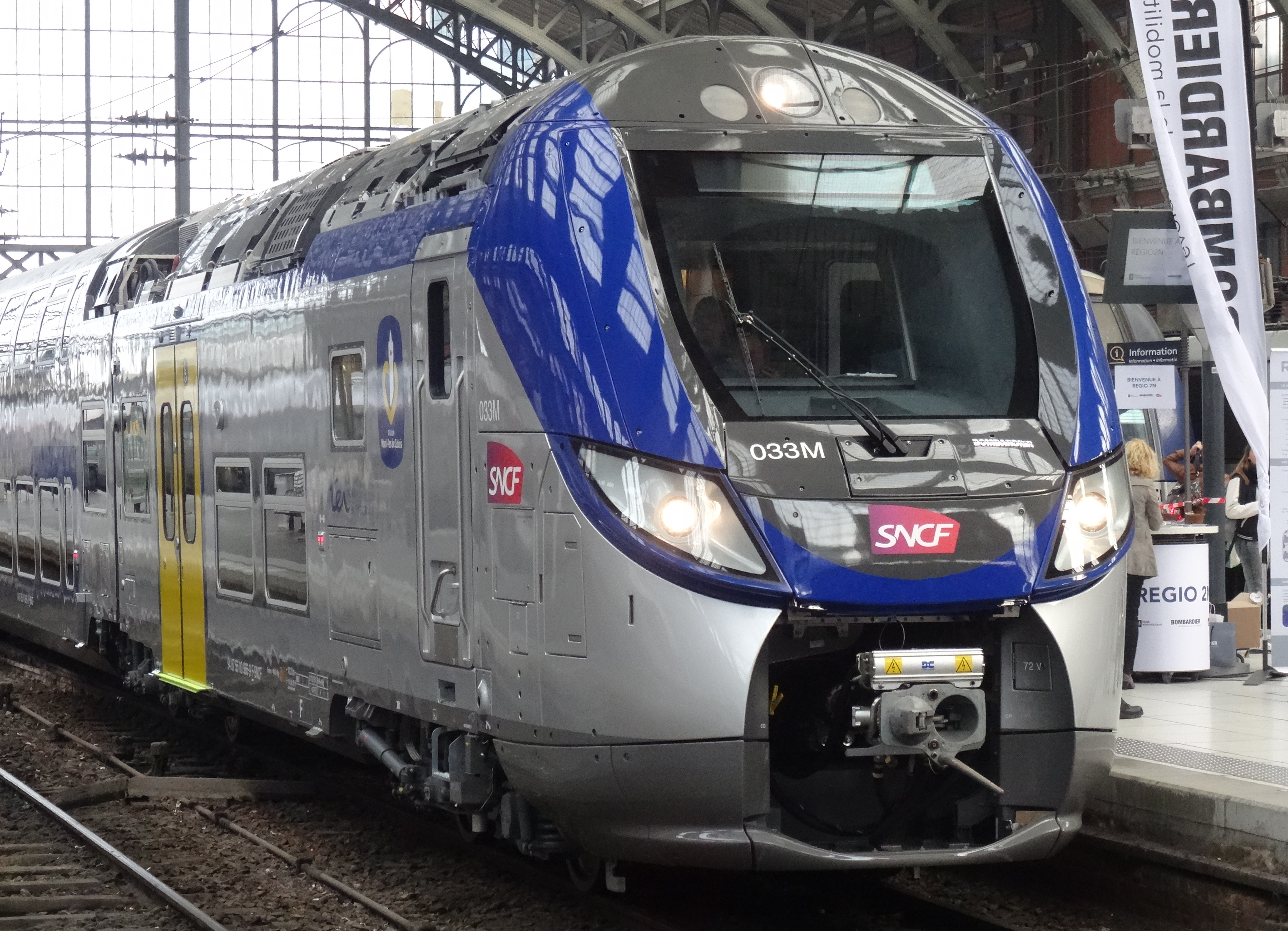 Présentation du Regio 2N de Bombardier Transport le 22 septembre 2014 en gare de Lille-Flandres, Lille, Nord, Nord-Pas-de-Calais, France.